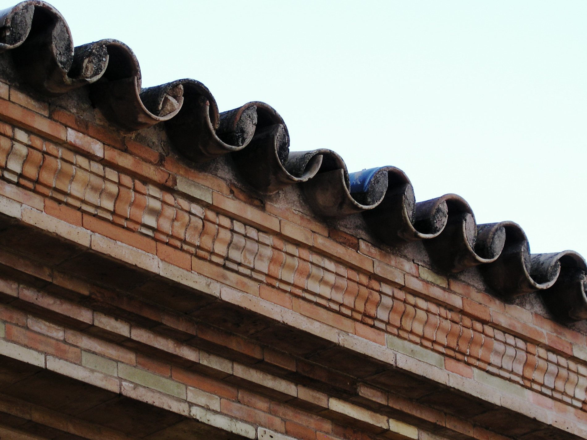 Plaza de España, Sevilla, Spain. Roof tiles and brick eaves.